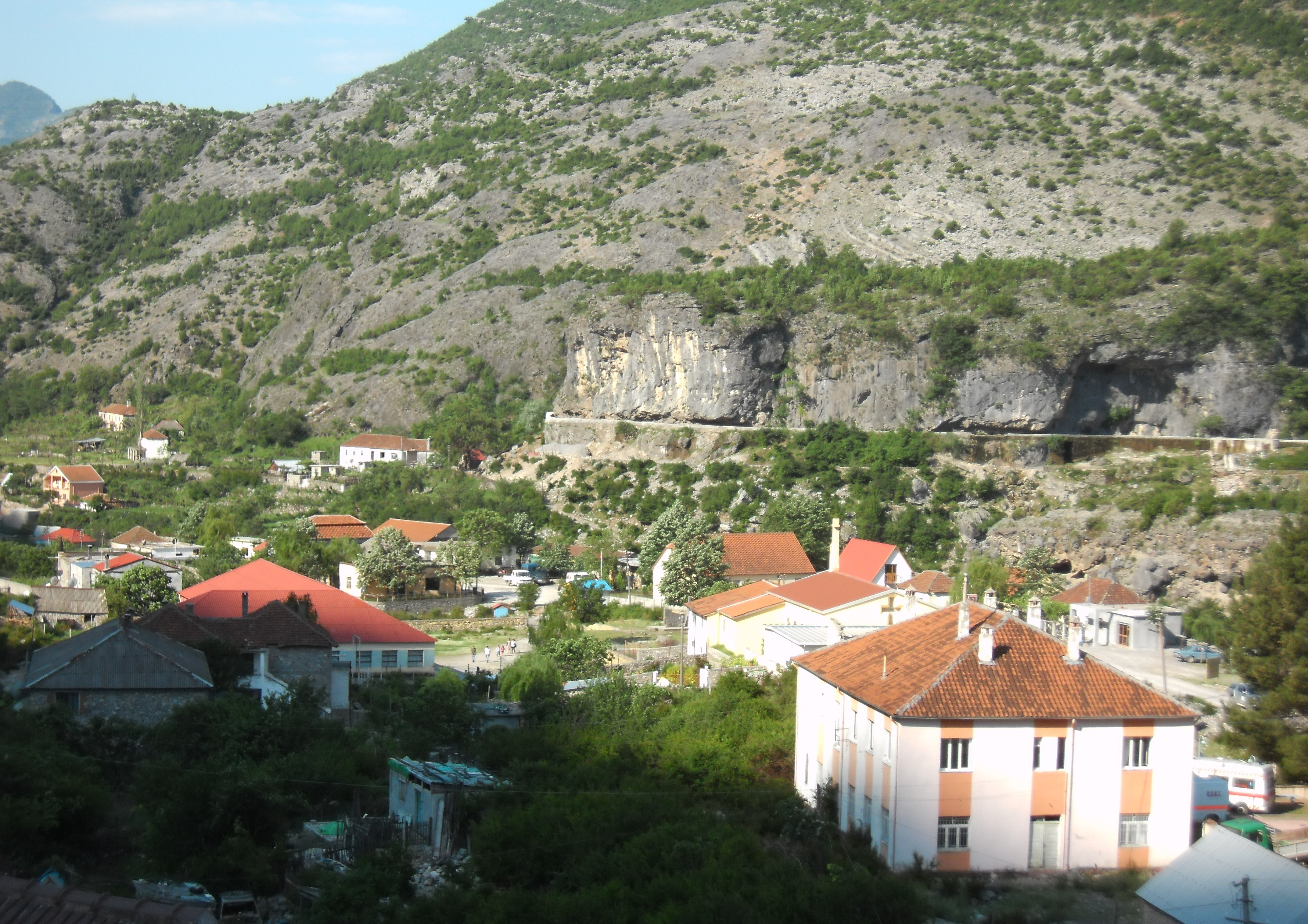 Blick auf das Dorf Tamara, Albanien